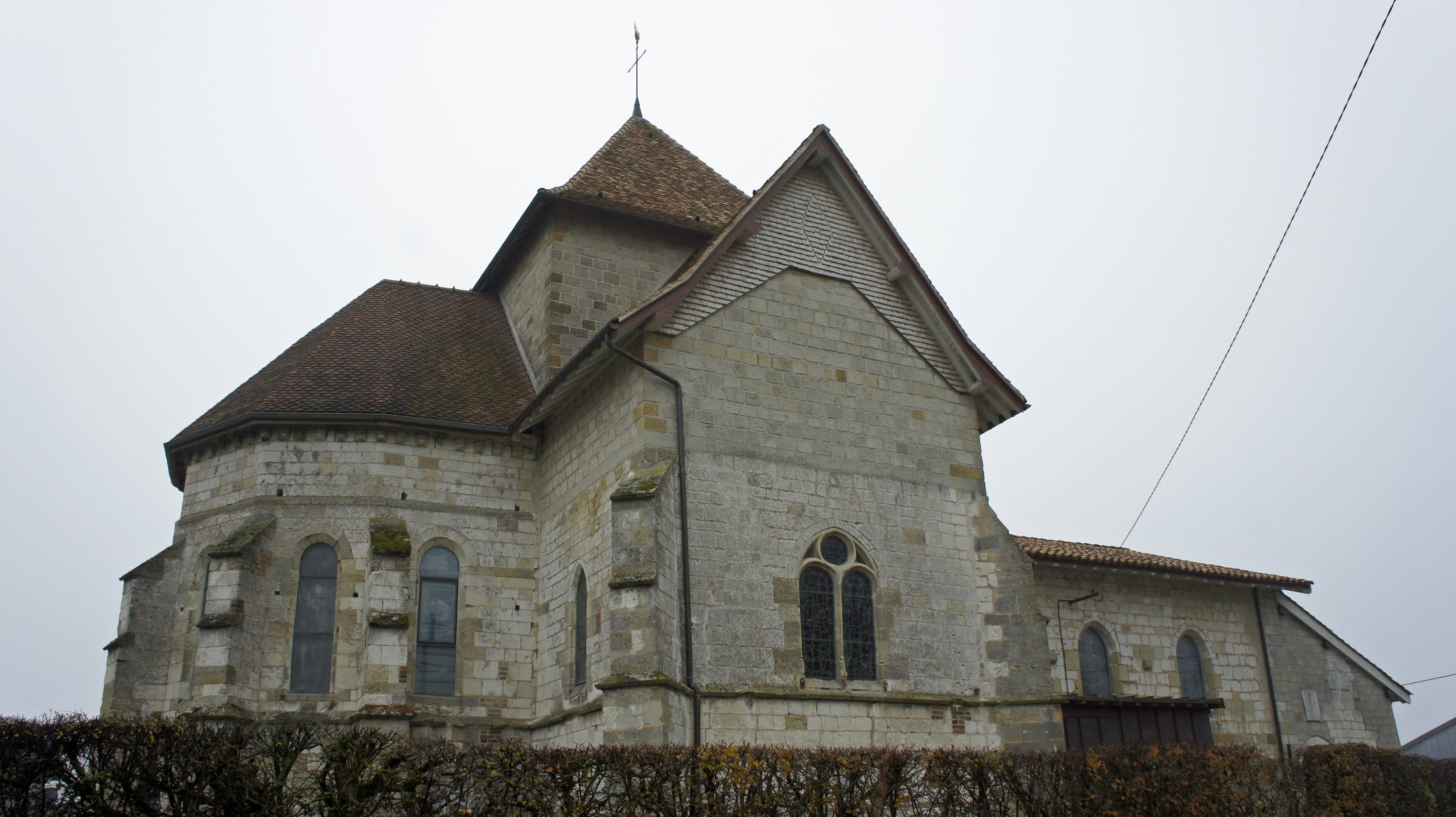 Côté Nord de l'église st-Martin de Dommartin sous Hans.